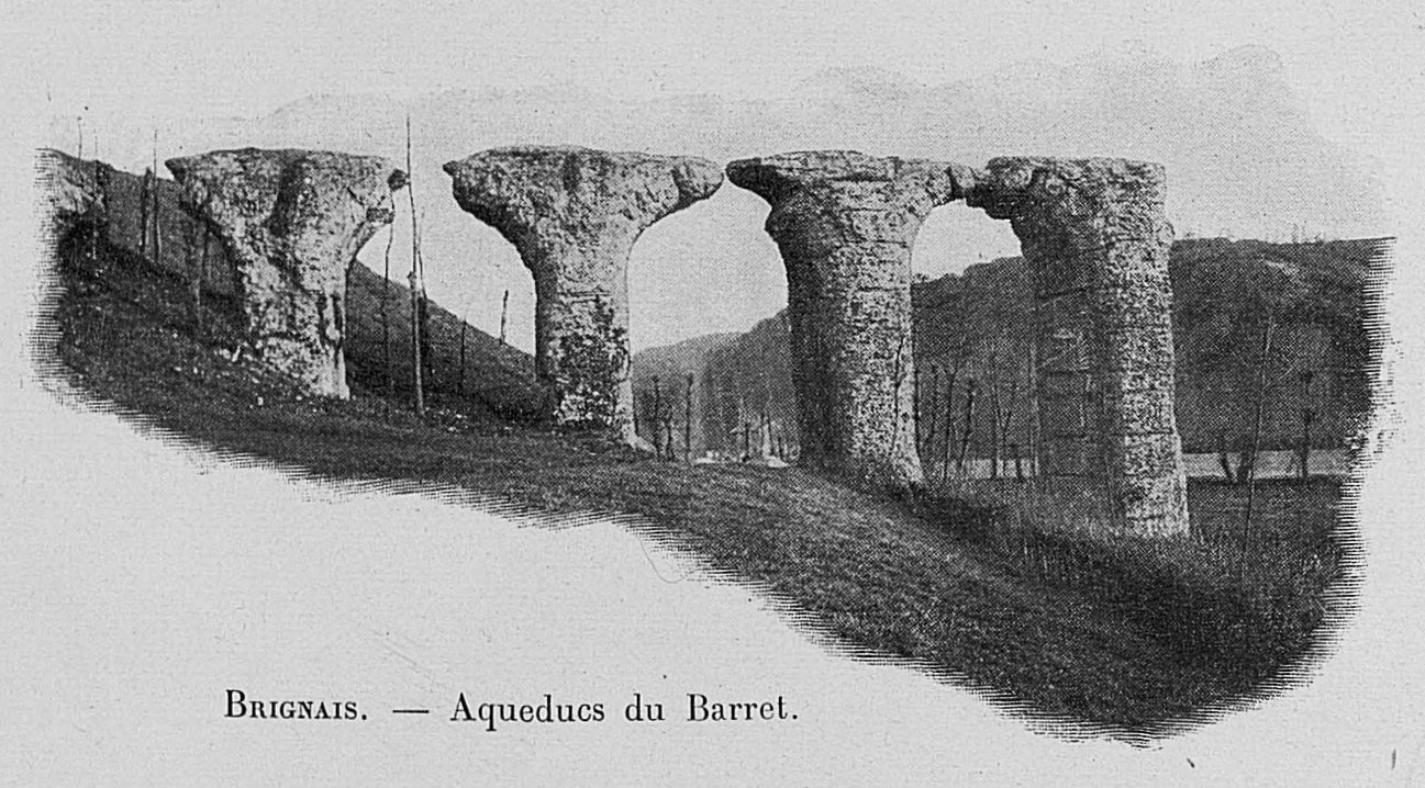 Dictionnaire illustré des communes du département du Rhône. Tome 1 / par MM. E. de Rolland et D. Clouzet. Aqueduc de Gier à Barret, commune de Brignais